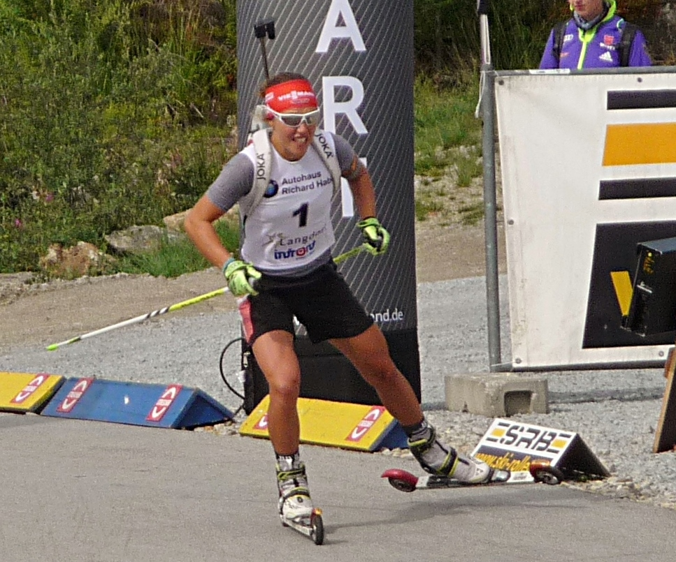 Laura Dahlmeier bei der Deutschen Biathlon-Meisterschaft 2015